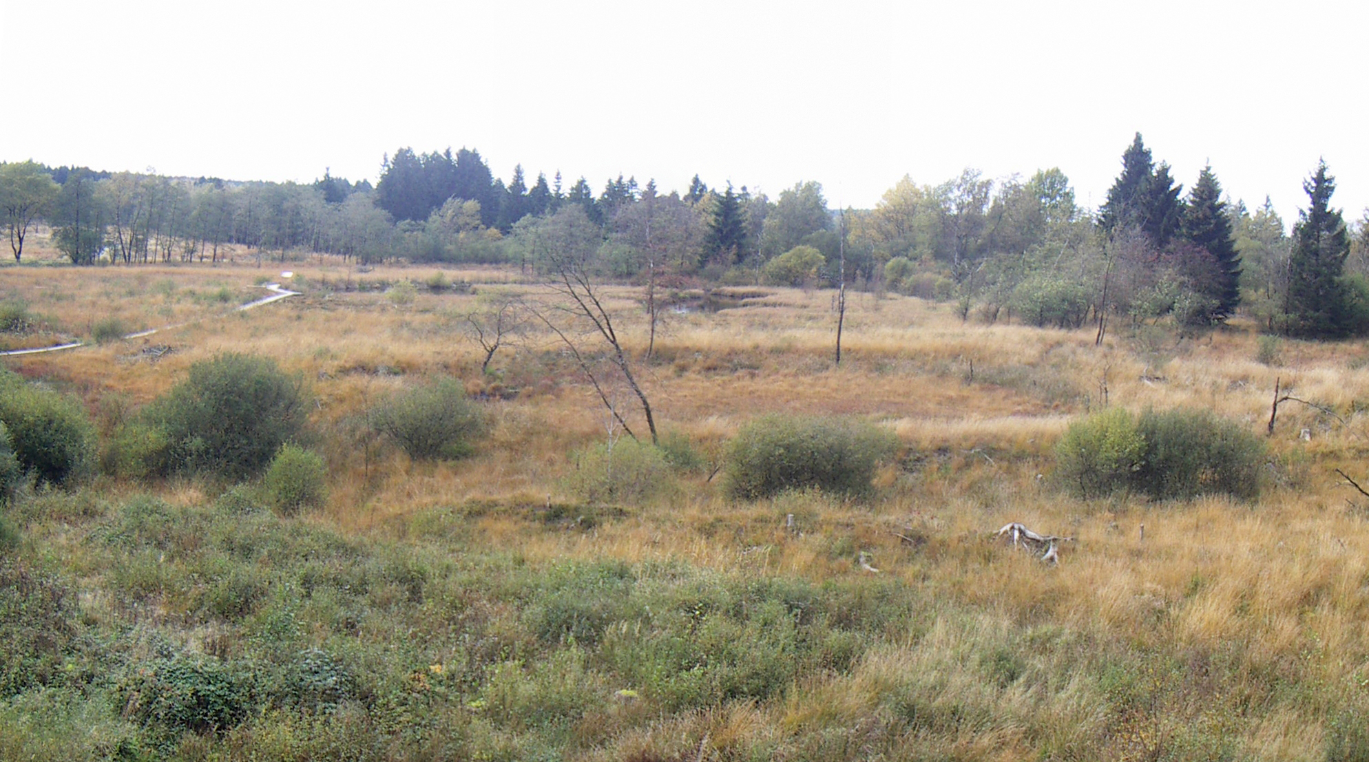 Ringförmiger Wall eines eiszeitlichen Palsen im Hohen Venn